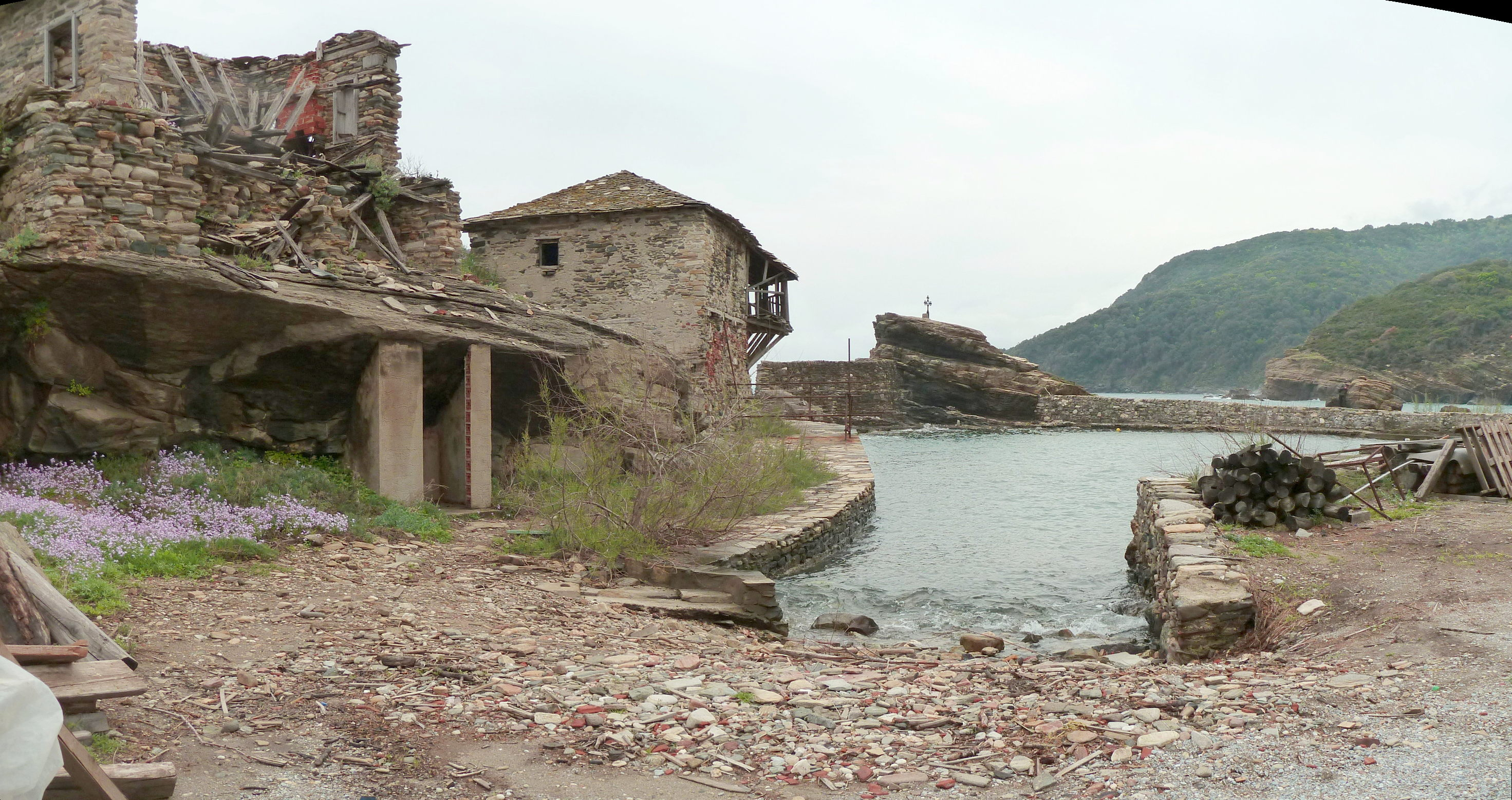 Port (arsanas) du monastère du Pantokrator (Mont Athos)